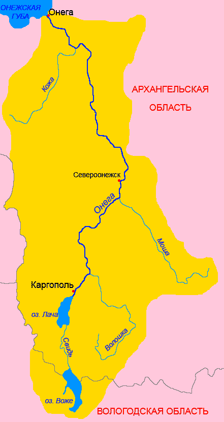 Схема бассейна реки Онега